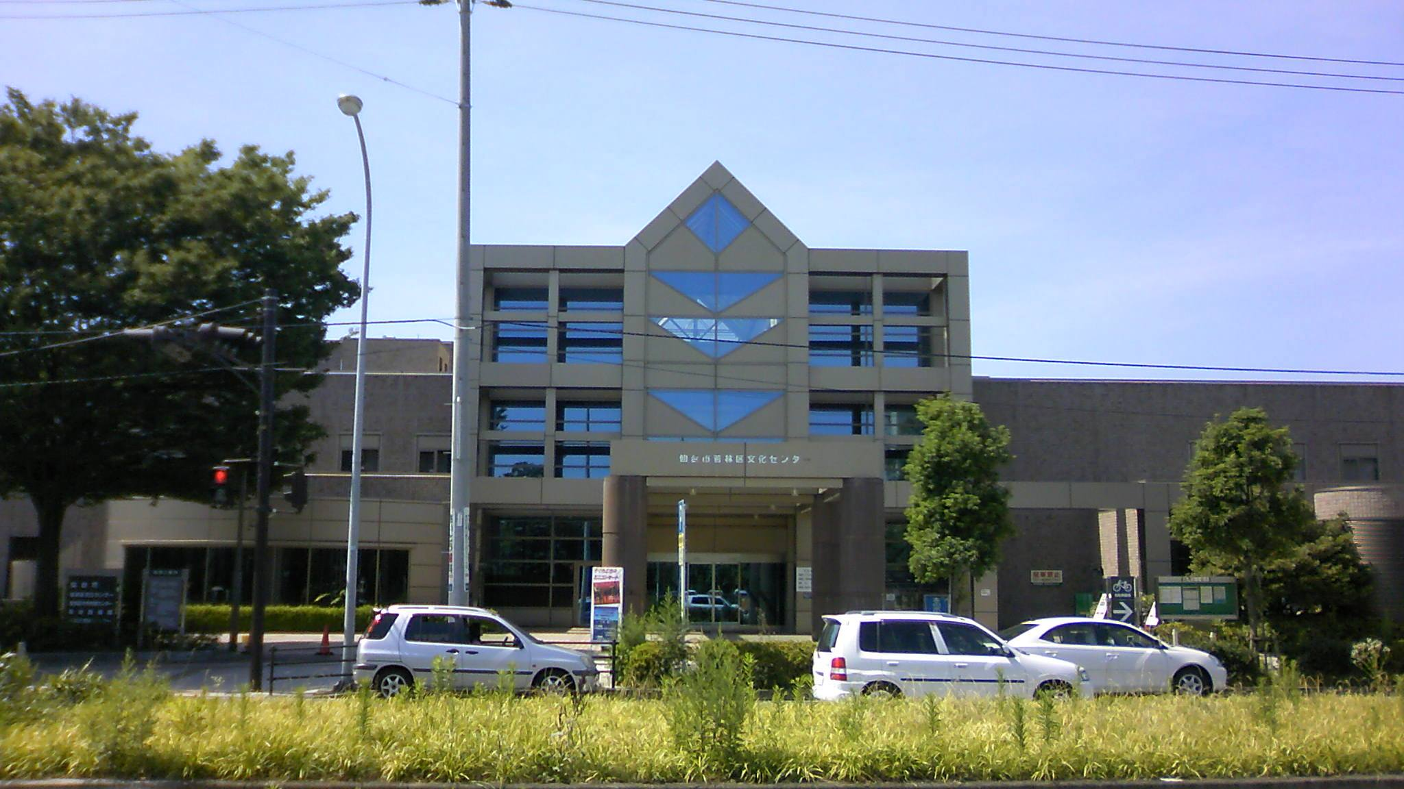 仙台市若林図書館